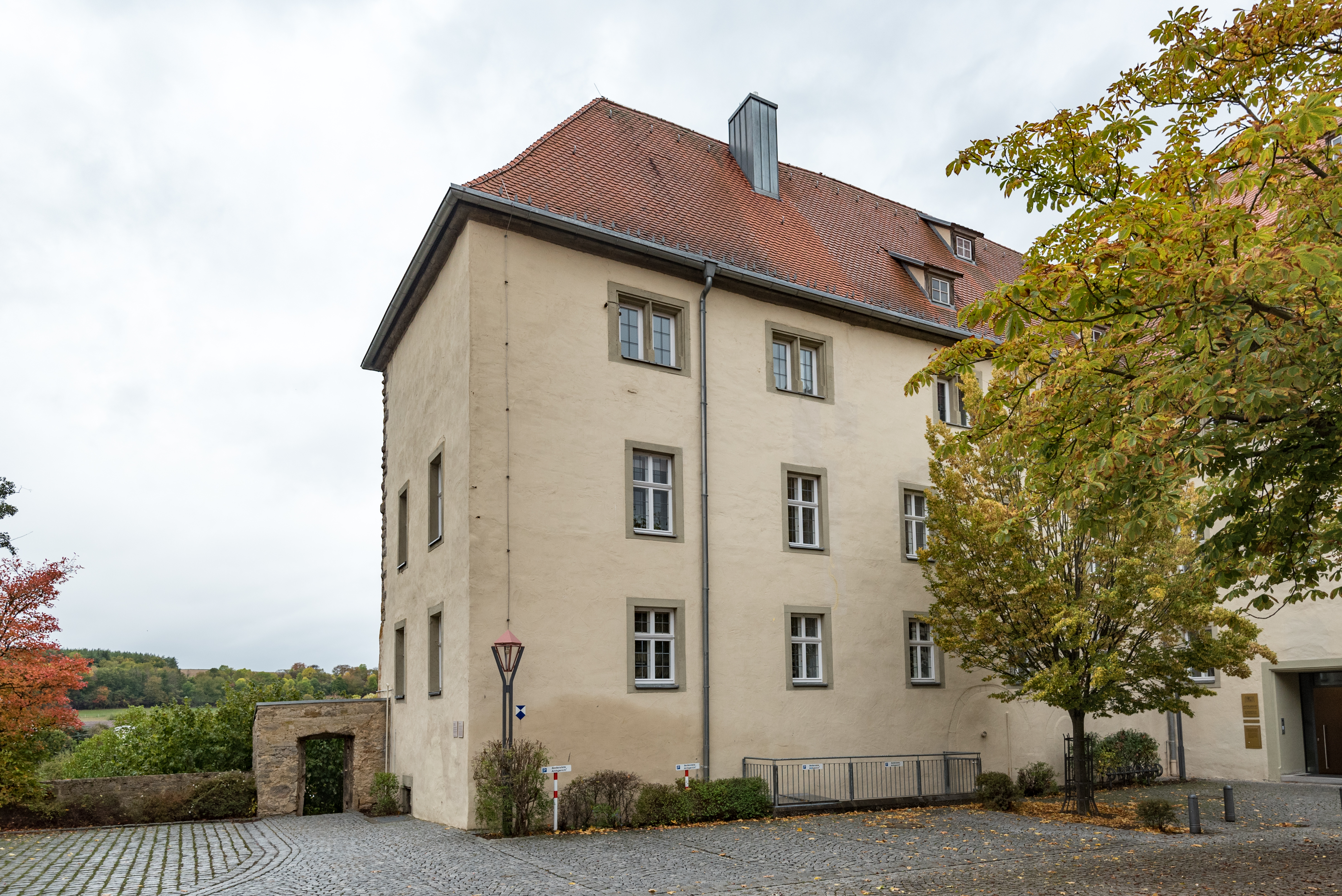 Mellrichstadt, Hauptstraße 6